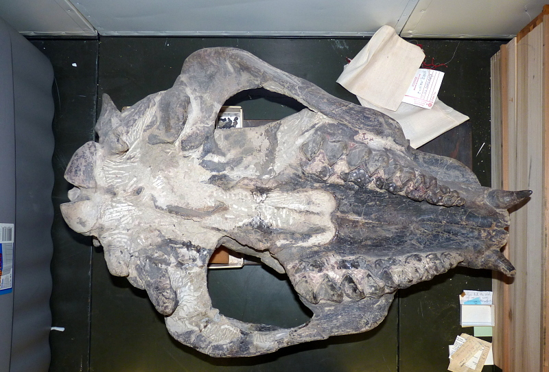 Diplacodon sp